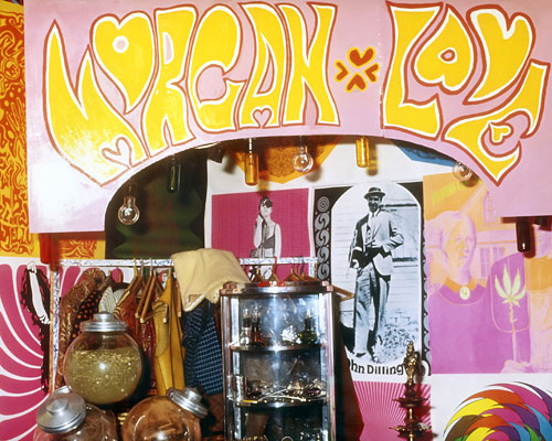 Marta Minujín. Importación/Exportación (1968) en el Instituto di Tella, Buenos Aires.